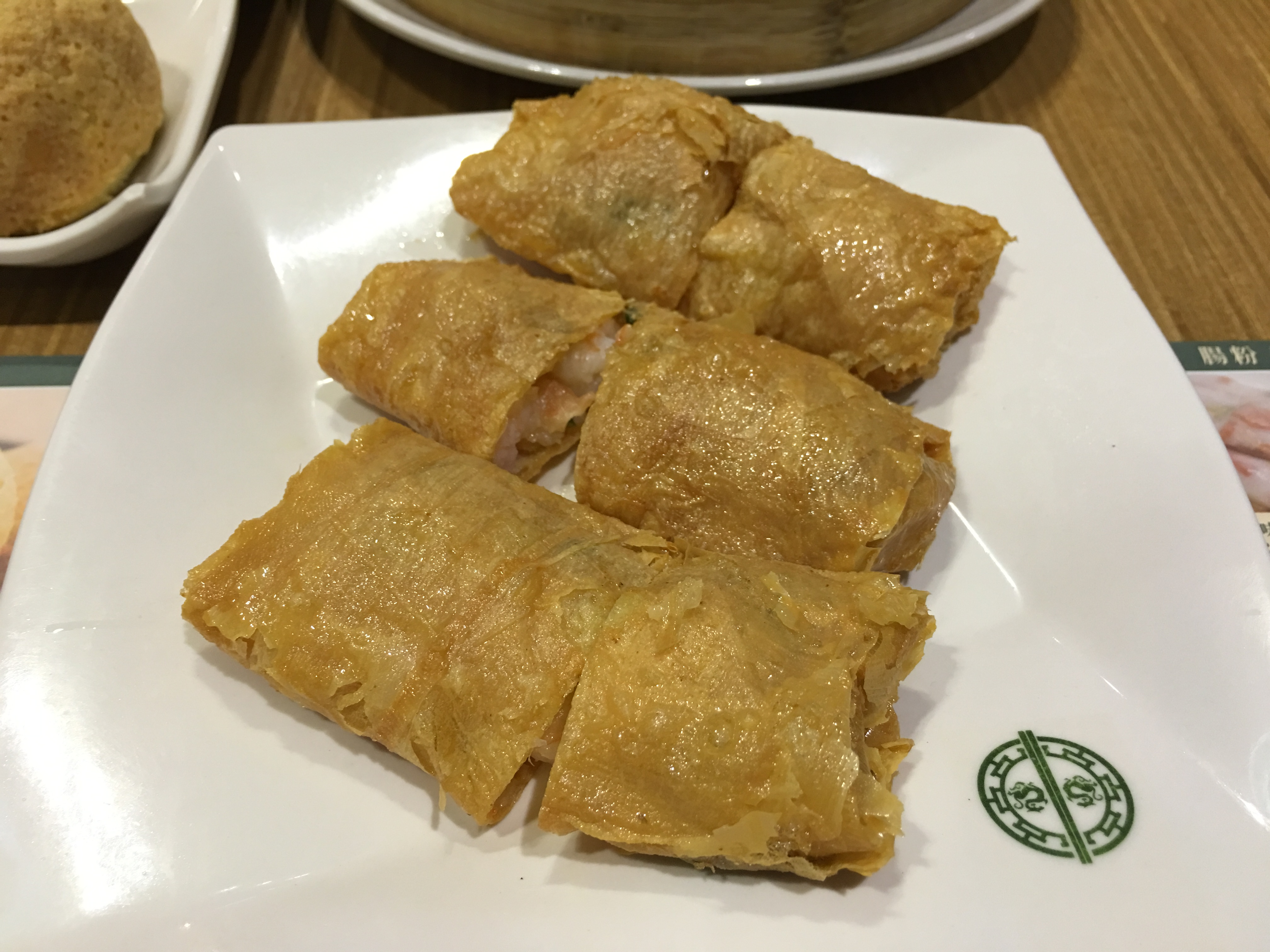 鮮蝦腐皮卷, 添好運, Timhowan, 台北